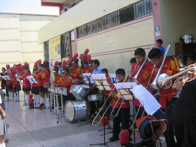 Banda musical del colegio peruano-chino Diez de Octubre.